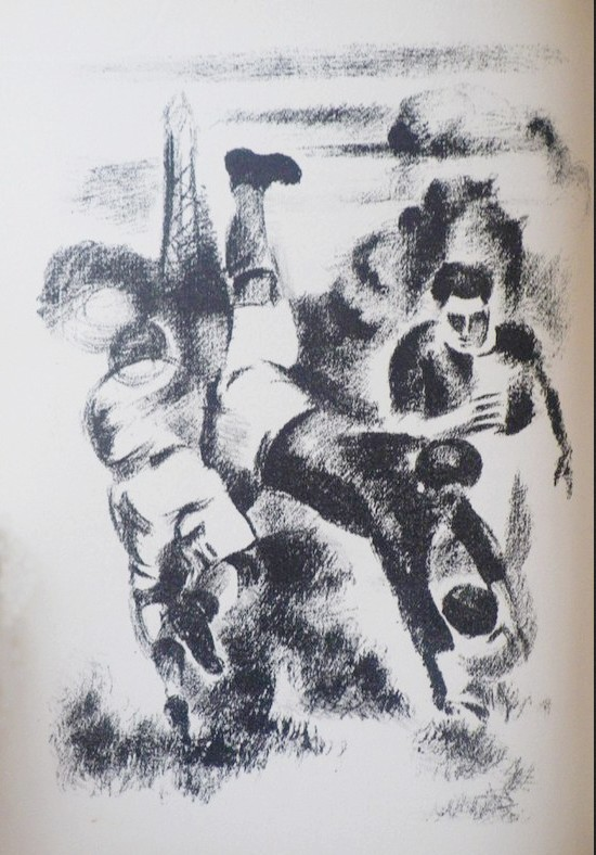 Lithographie originale de Robert Delaunay (1885-1941) pour La Relève du matin de Henry de Montherlant, édition SPES. Une des dix planches hors-texte (les footballeurs).